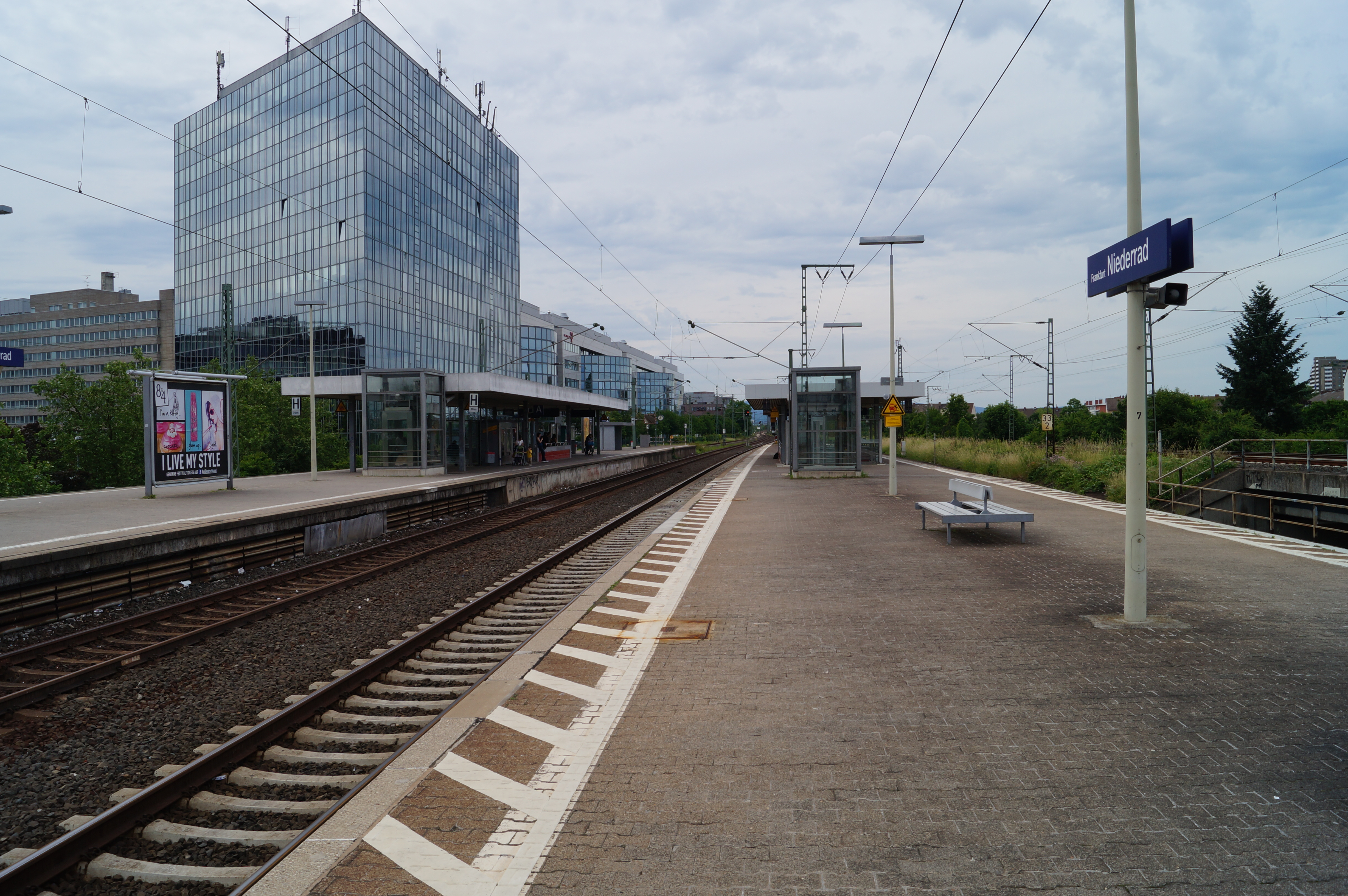 Bahnsteige des Bahnhofs Frankfurt-Niederrad